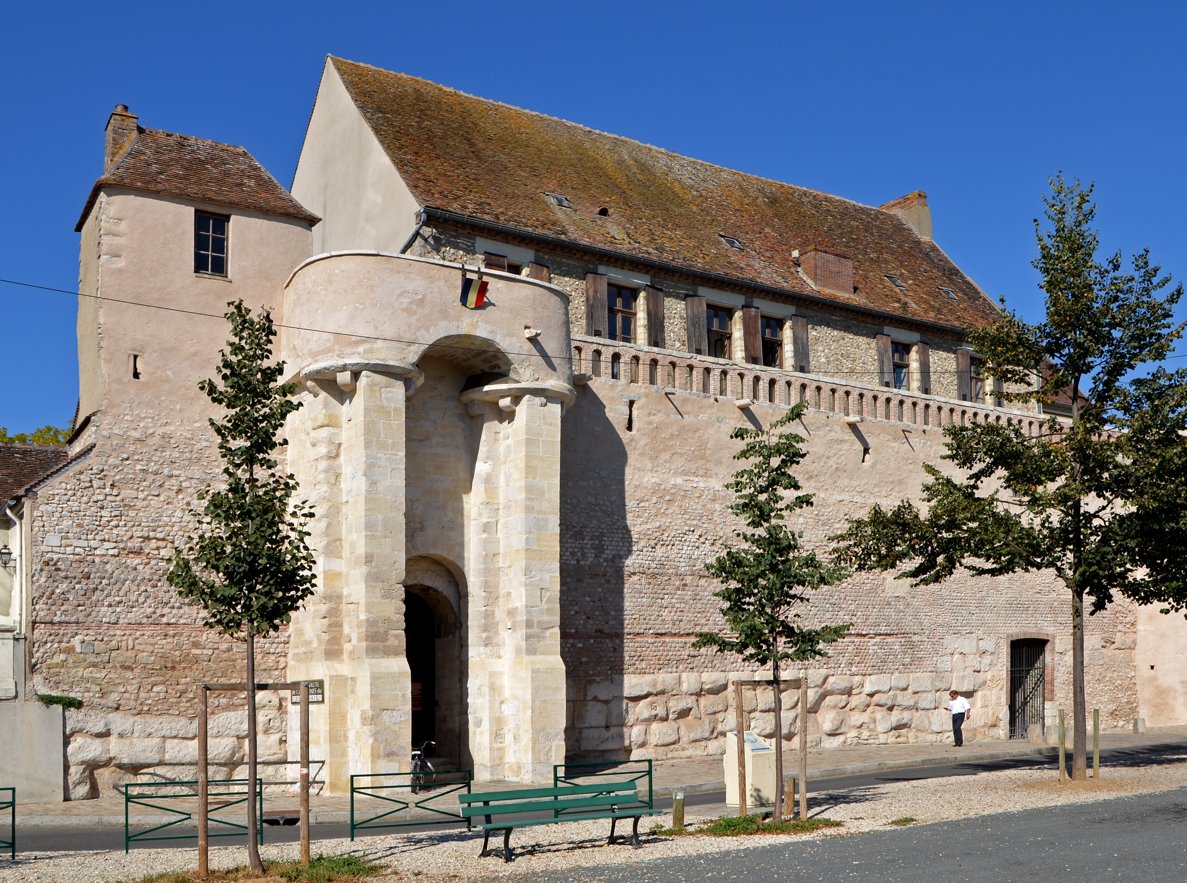 Remparts de Sens, Yonne, Bourgogne,France